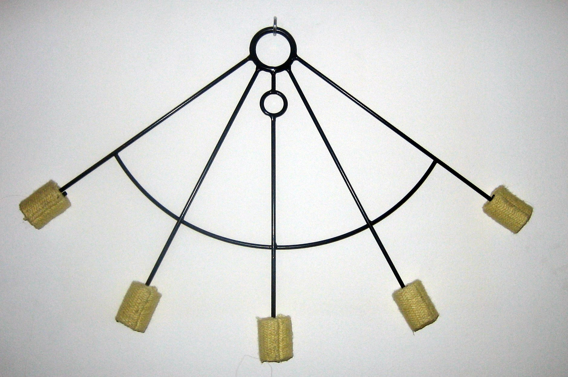 Fire Fan